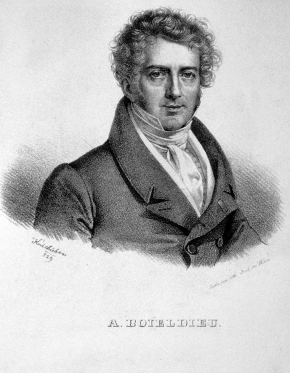 François Adrien Boieldieu, Lithographie von Josef Kriehuber, 1829